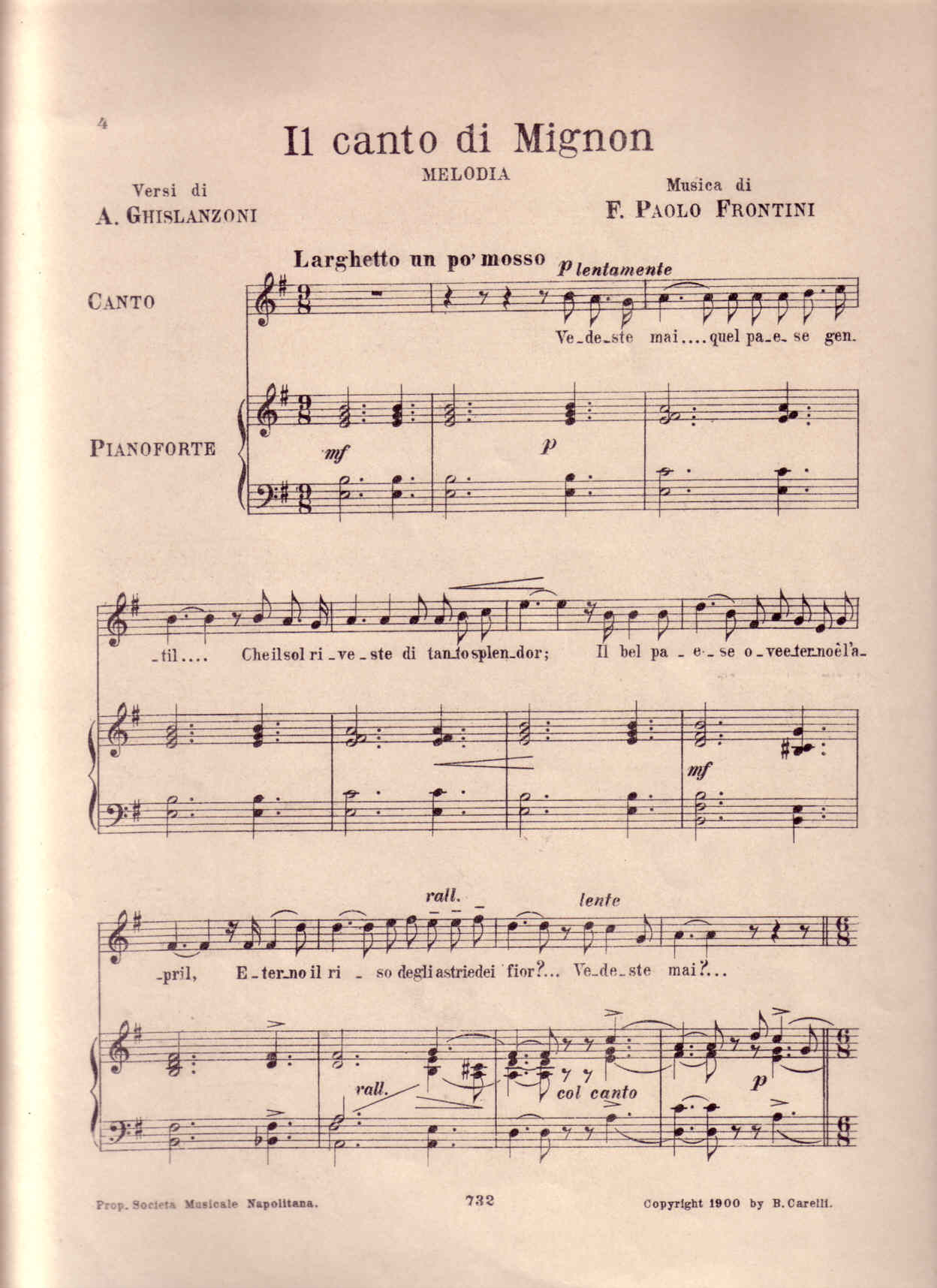 Partition de Il canto di Mignon, poésie lyrique d'Antonio Ghislanzoni, musique de Francesco Paolo Frontini